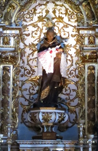 Salvador (Bahía), St. Franziskus, Statue des hl. Antonius von Padua